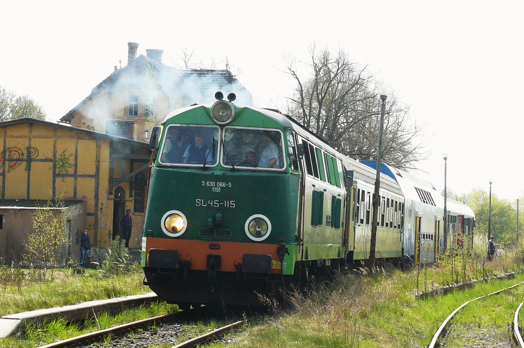 SU45-115 z pociągiem specjalnym "Dolnośląskie Zakamarki" (25.4.2015r.). Osiecznica Kliczków.